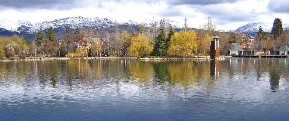 Estany de Puigcerdà, Cerdanya, Catalunya.